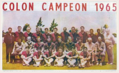 El equipo del ascenso 1965: Tremonti; Sanitá y Néstor Cardozo; Raúl Cardozo, García y Dumas Rodríguez; Orlando Medina, el "Pulga" Ríos, Canevari, Obberti y Orlando Medina.